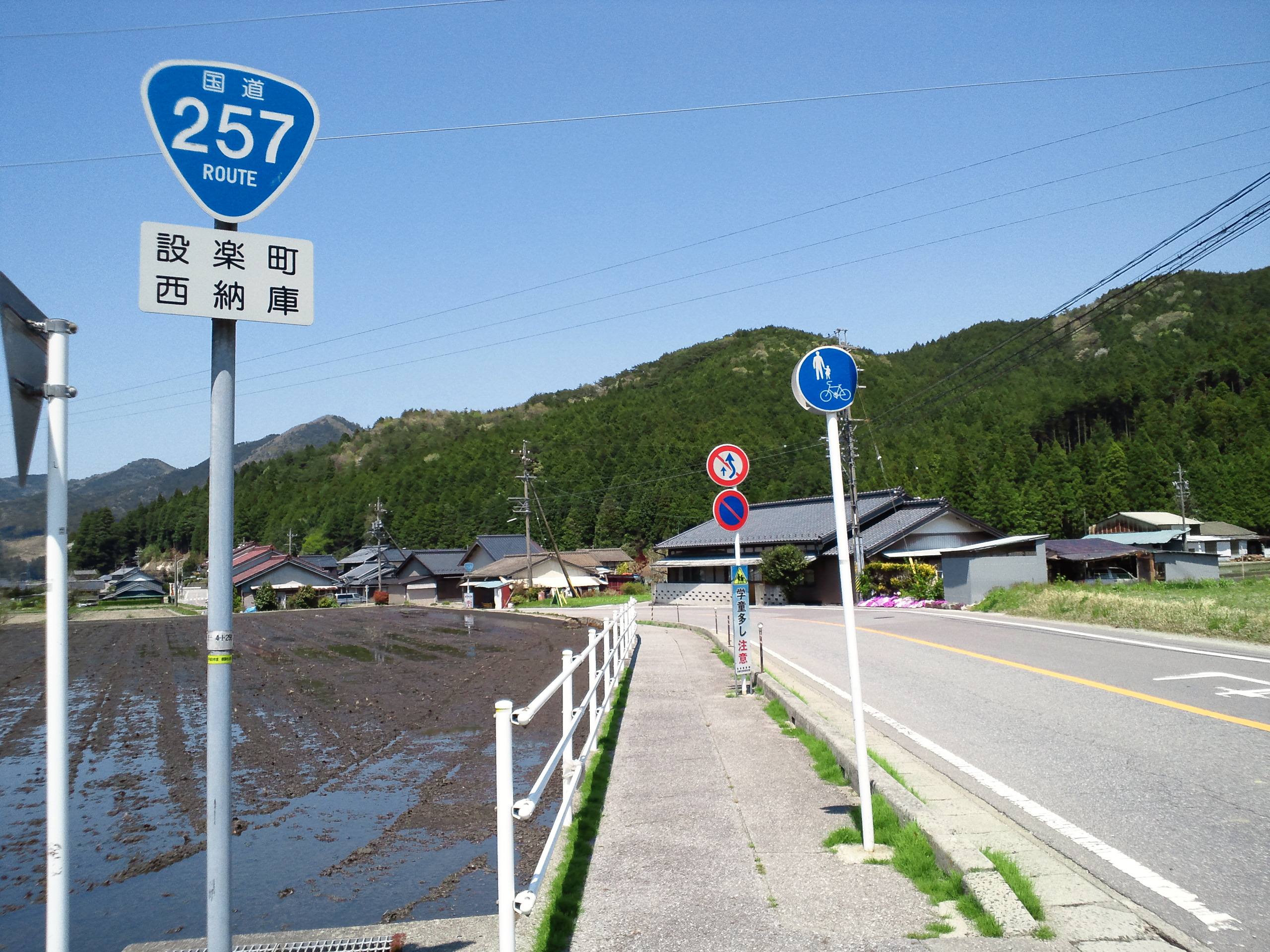 愛知県北設楽郡設楽町の国道257号。